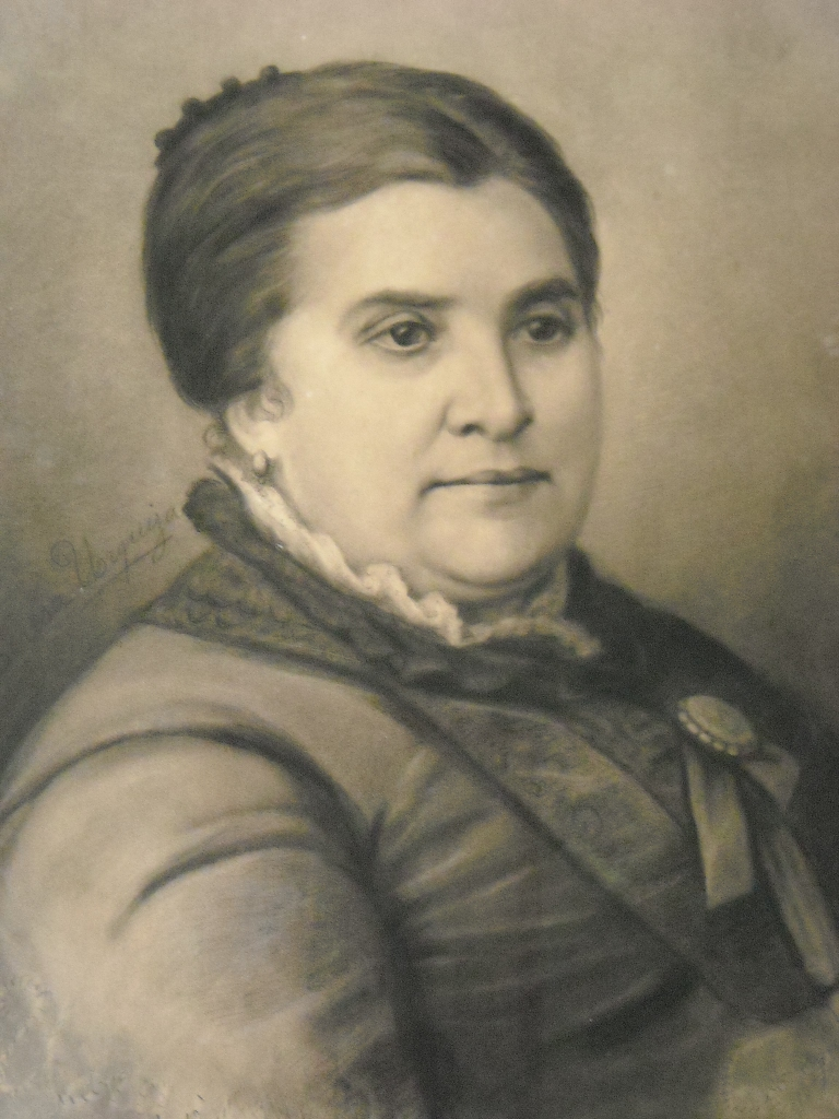 Foto del retrato a lapiz de Dolores Costa de Urquiza que se encuentra en el Palacio San Jose, Entre Rios.